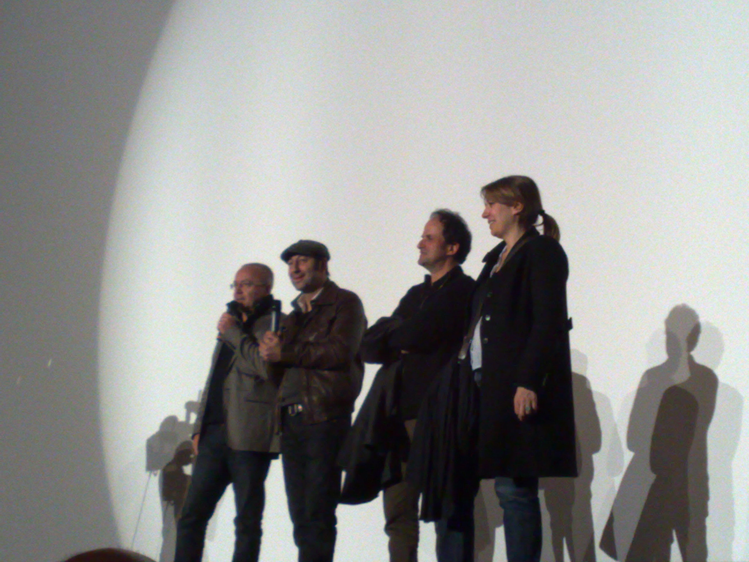 En présence de Olivier Baroux, Kad Merad, Lionel Abelanski, Valérie Benguigui, des acteurs très simples et très enthousiastes pour la présentation d'un film drôle mais, disons le, qui ne casse pas des briques tout de même. On en prend tout de même une bonne tranche de rigolade. Lire plus sur Allociné